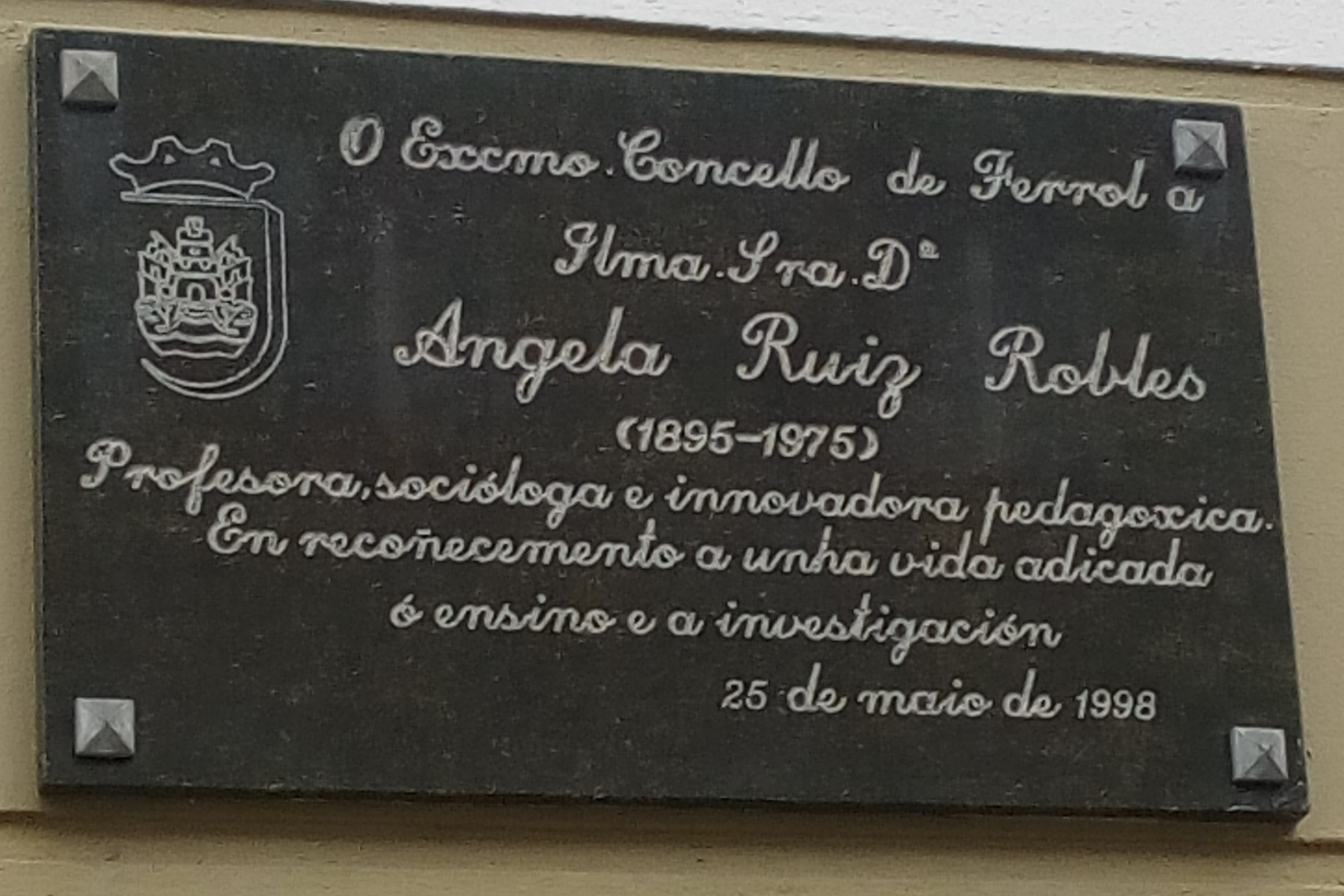 Placa del ayuntamiento de Ferrol (A Coruña), España dedicada al reconocimiento de los trabajos como maestra, pedagoga e inventora de Ángeles Ruíz Robles en la ciudad donde desarrolló la mayor parte de su trabajo